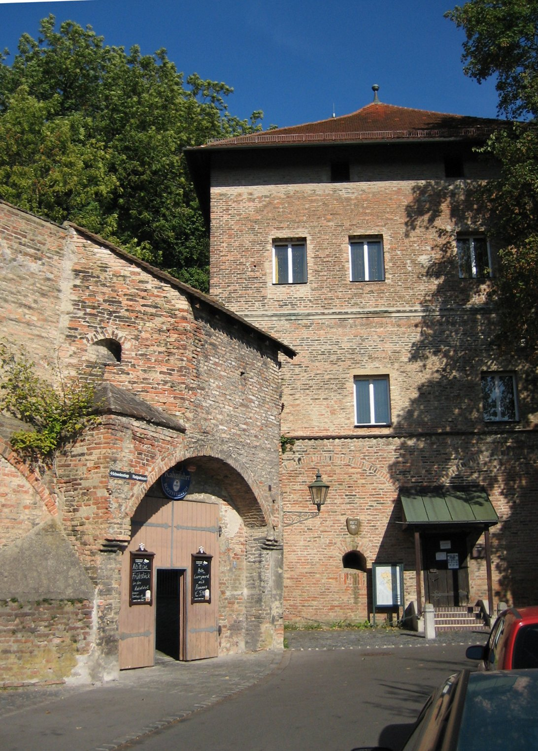 Eingang zur Kahnfahrt in Augsburg (linke Bildseite). Der Turm dahinter gehört zum Oblatterwall, einer Ringbastei aus dem Mittelalter, die die Nordostecke der alten Stadtmauer um die Jakobervorstadt bildet.